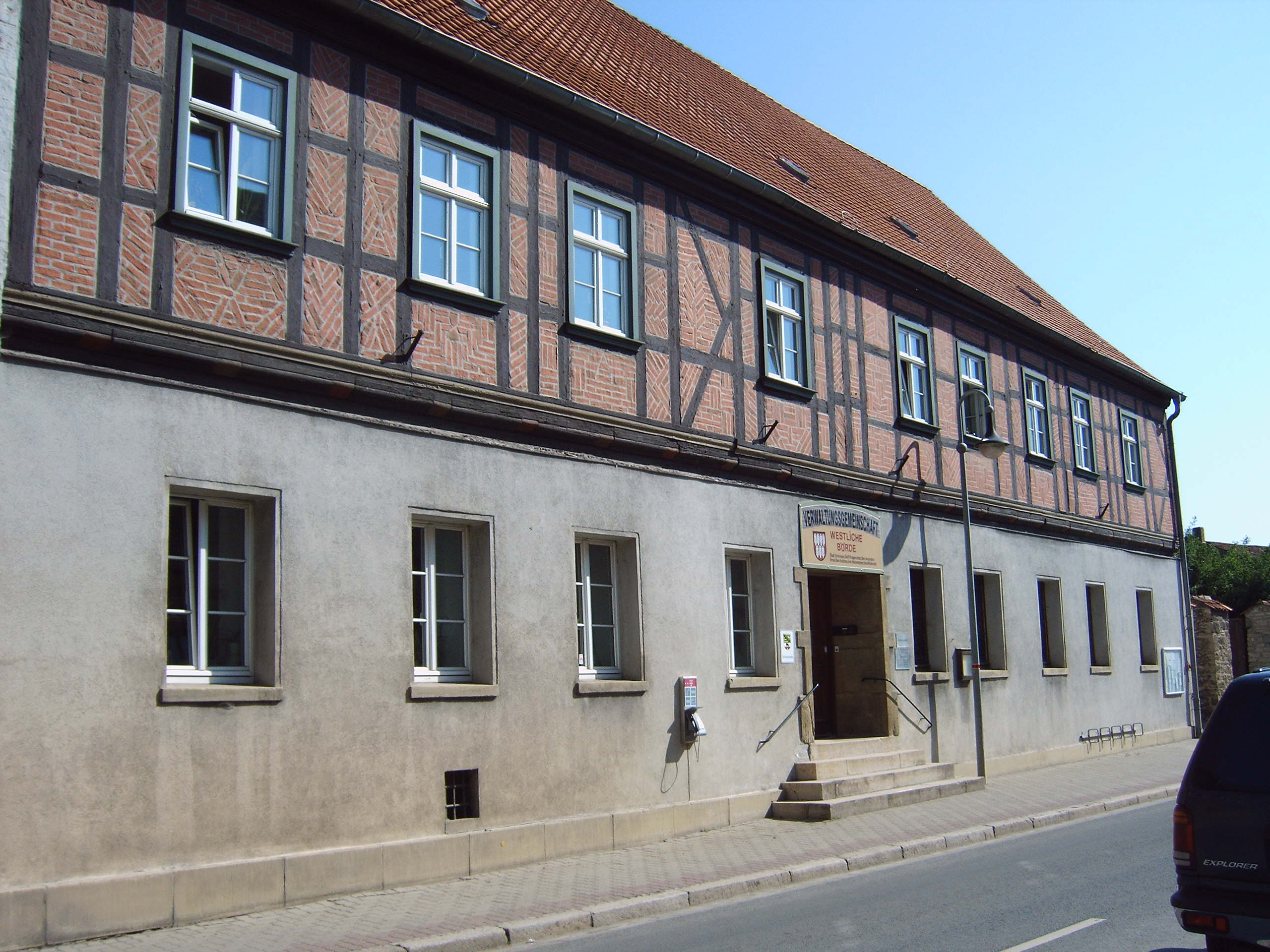 Gebäude der Verwaltungsgemeinschaft Westliche Börde in Gröningen, Deutschland Bild aufgenommen von Olaf Meister am 10.5.2006